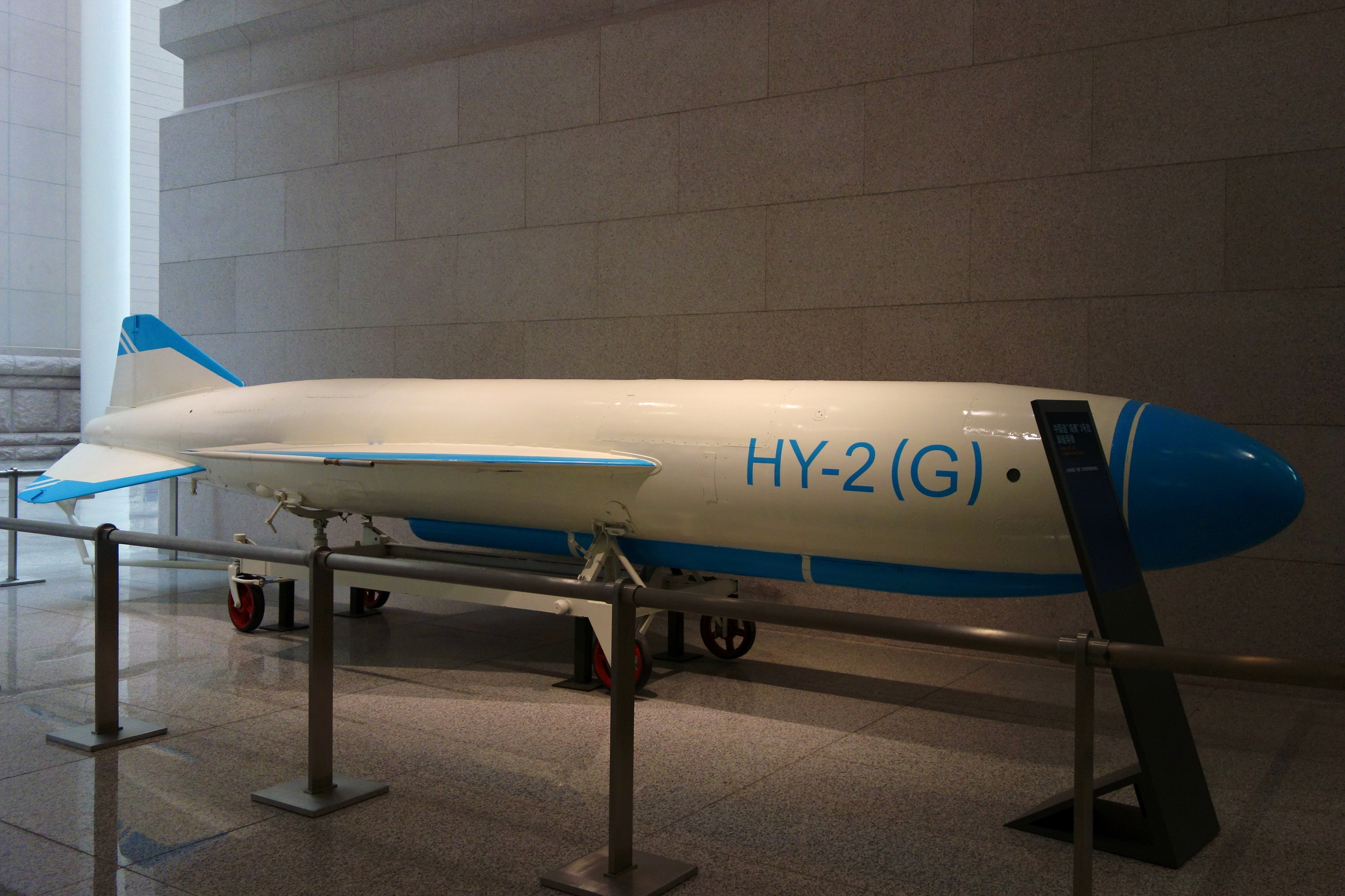 “海鹰”2号改型岸舰导弹，拍摄于中国人民革命军事博物馆。